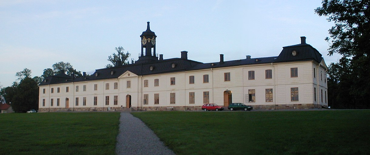 Svartsjö slott near Stockholm, Sweden